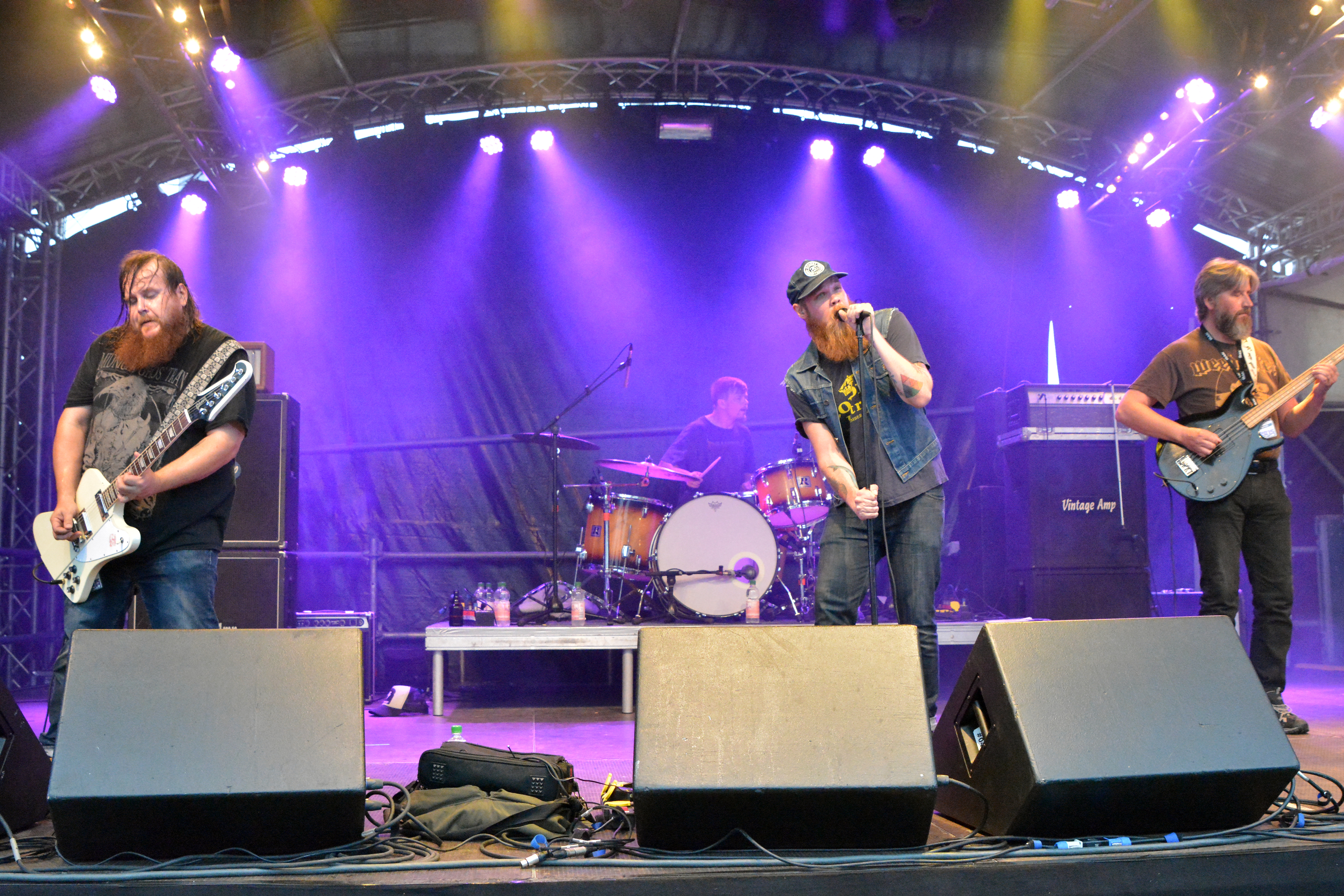 Greenleaf beim Ackerfestival 2015